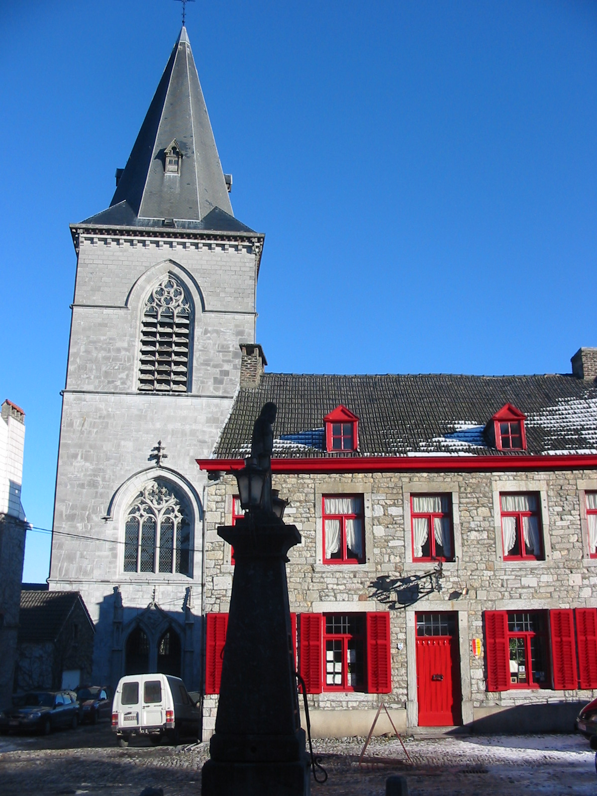 Belgium, Limbourg, Church